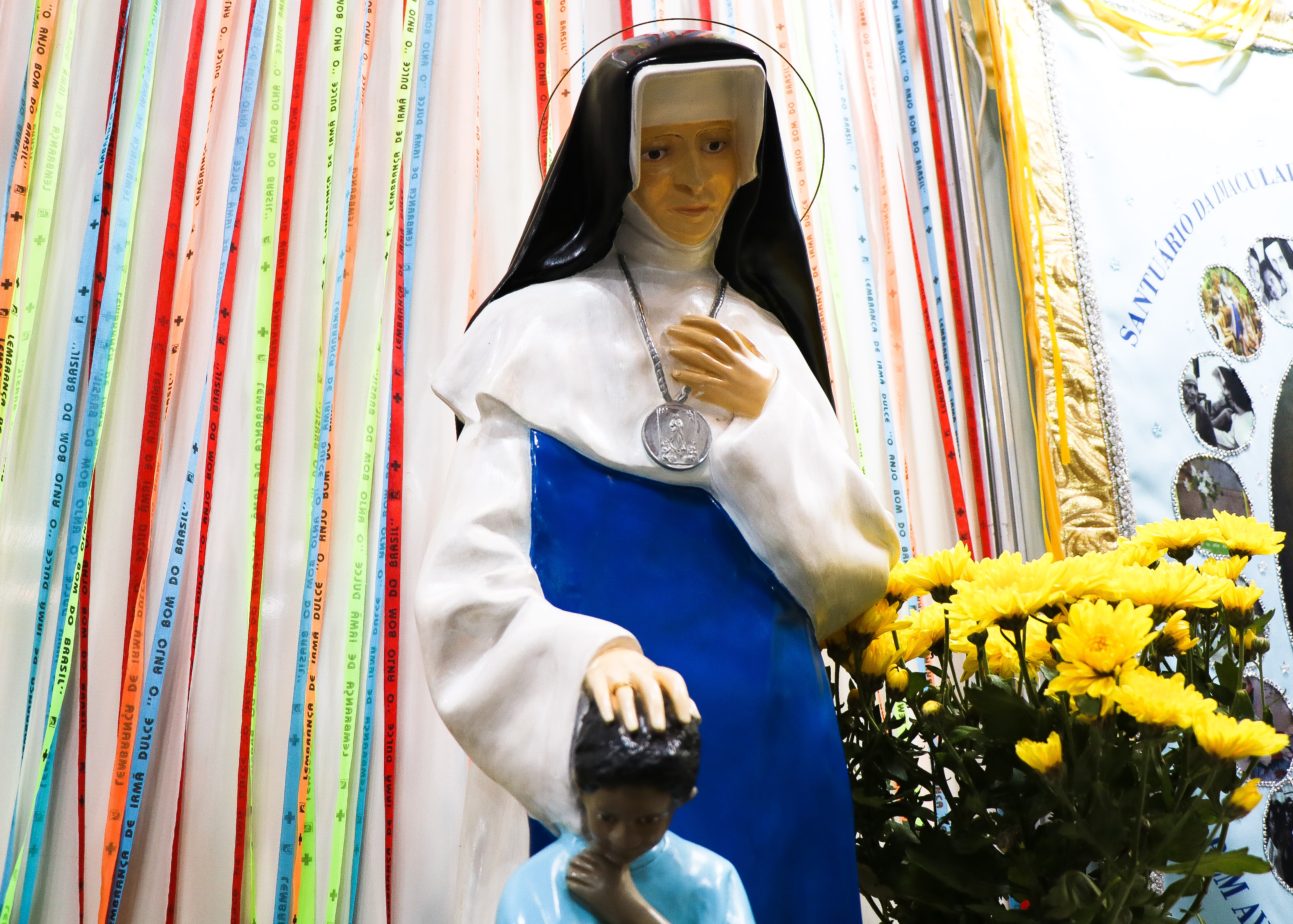 Congresso Brasileiro de Turismo Religioso, May 9-12, 2018, Salvador, Bahia, Brazil.